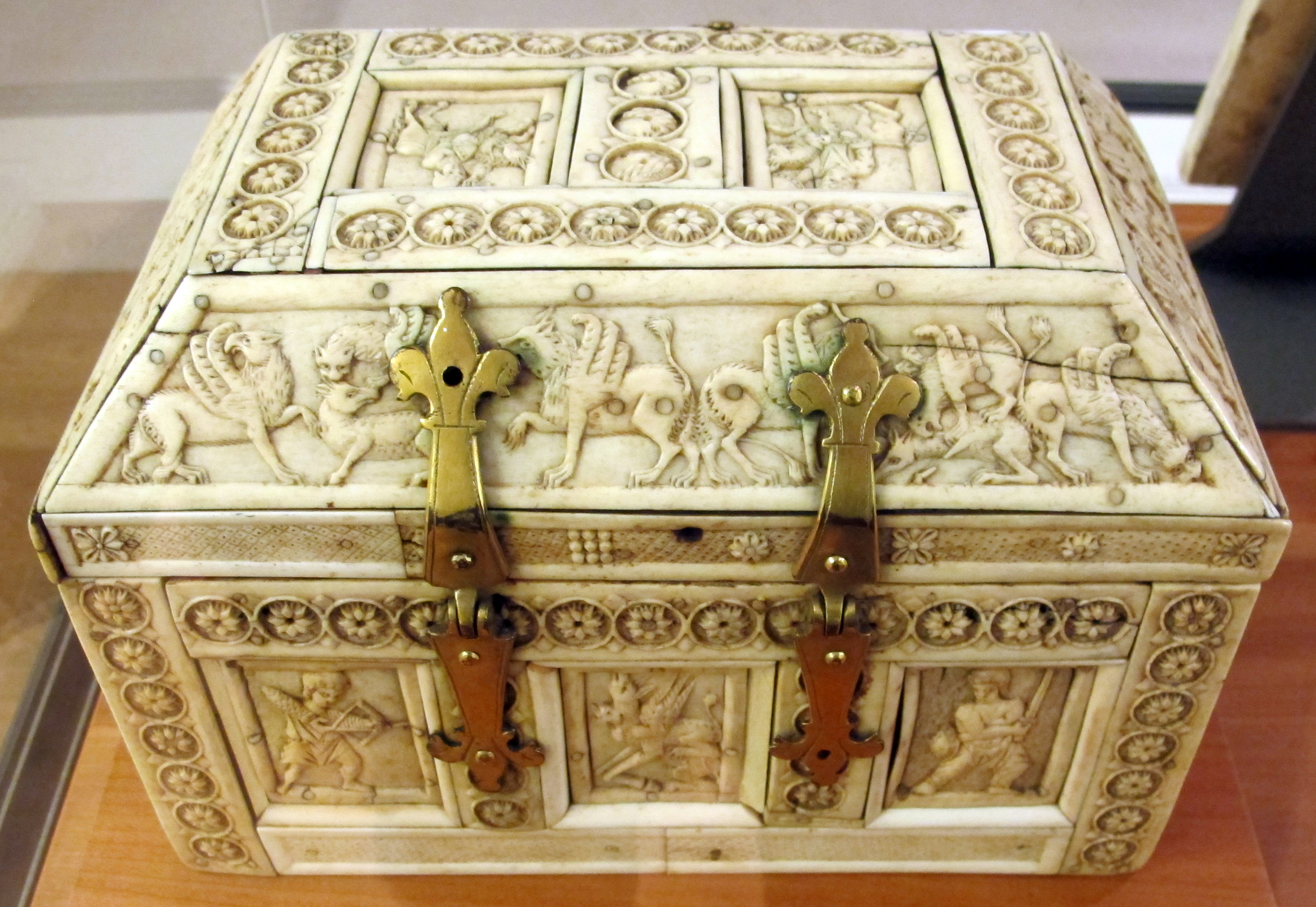 Petit Palais, Parigi